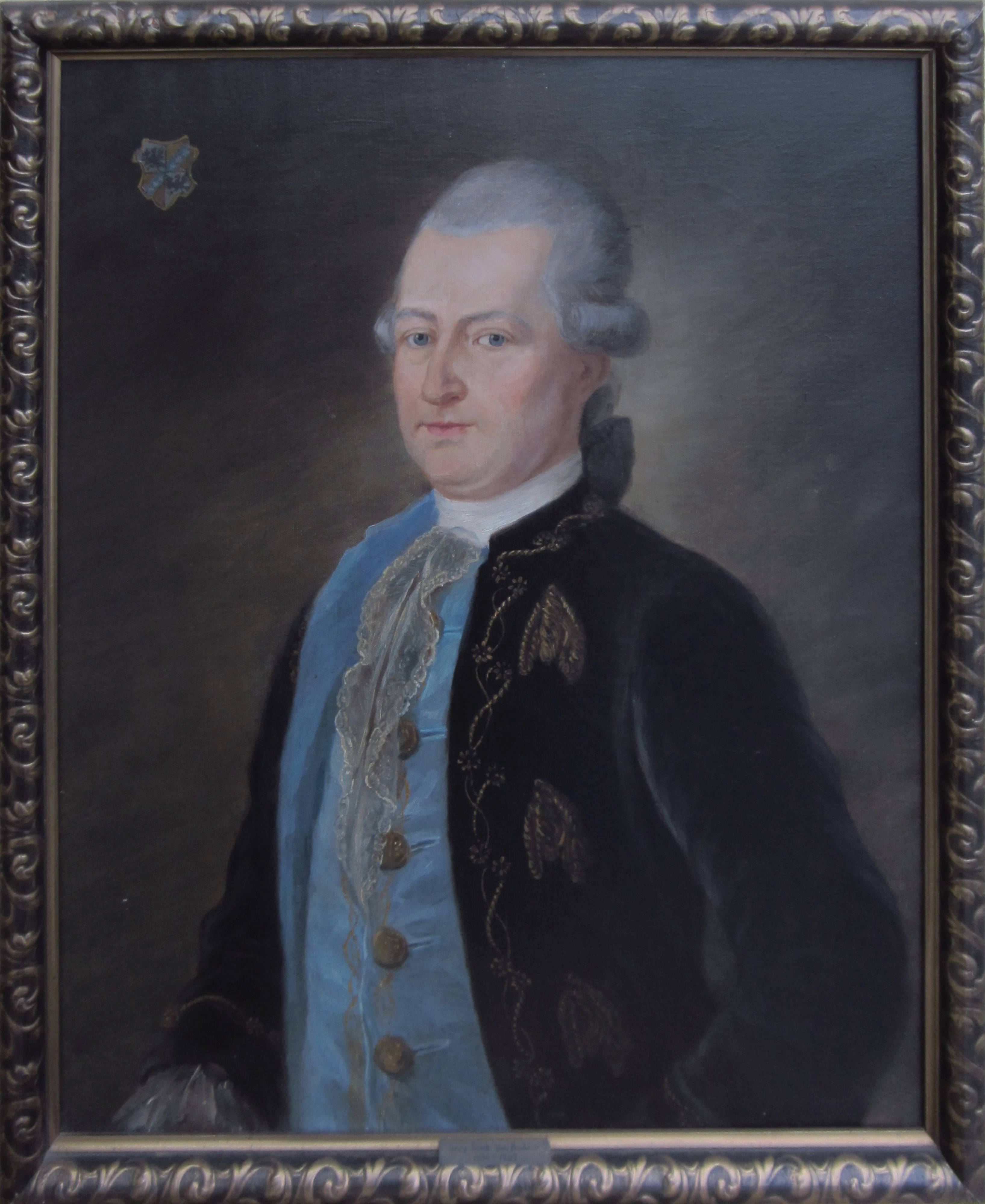 Georg Friedrich von Böhmer (1739–1797), zu Lebzeiten der dargestellten Person geschaffenes Pastell. Durch Marie Luise Ottilie von der Osten (* 25. Dez. 1856, † nach 1932) hiervon 1930 angefertigte originalgetreue Kopie in Öl auf Leinwand. Hiervon 2014 erstellte fotomechanische Reproduktion